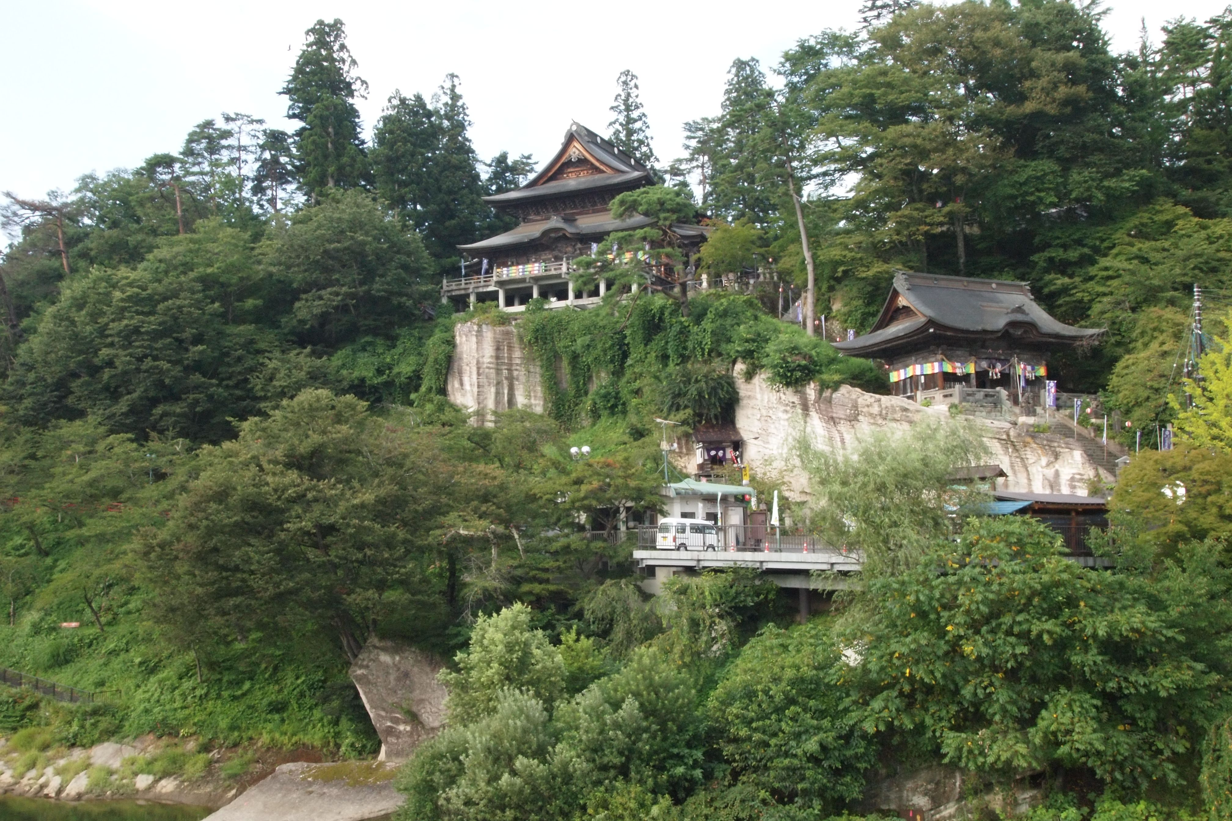 圓蔵寺